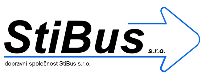 Logo používané od 3/2013